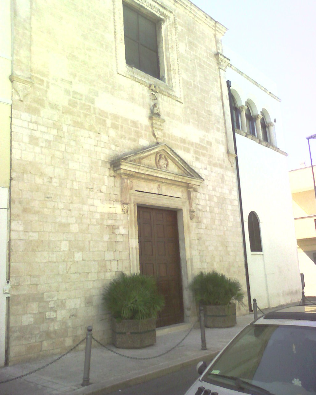 chiesa di sant'agostino - Modugno (bari)-Italy